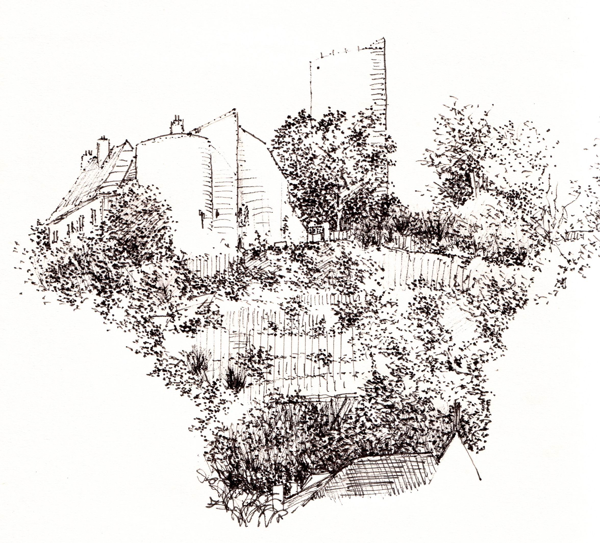 château de Châlus Chabrol